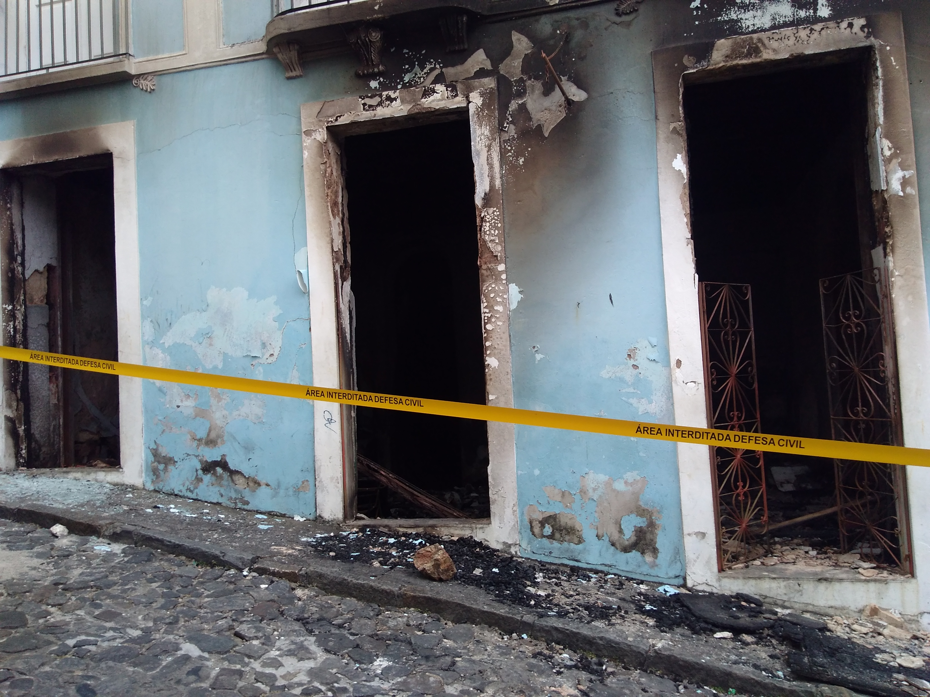 Fachada do Cine XIV após o incêndio em 11 de novembro de 2017